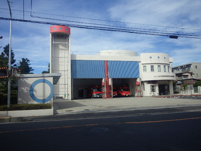 さいたま市消防局浦和消防署日の出出張所庁舎